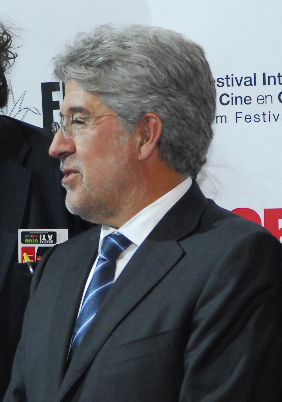 13.03.10 Gala de Homenaje Nacional. Mikel Olacideregui, José María Morales y Miguel Morales © Cortesía de FICG 25/ Oscar Delgado